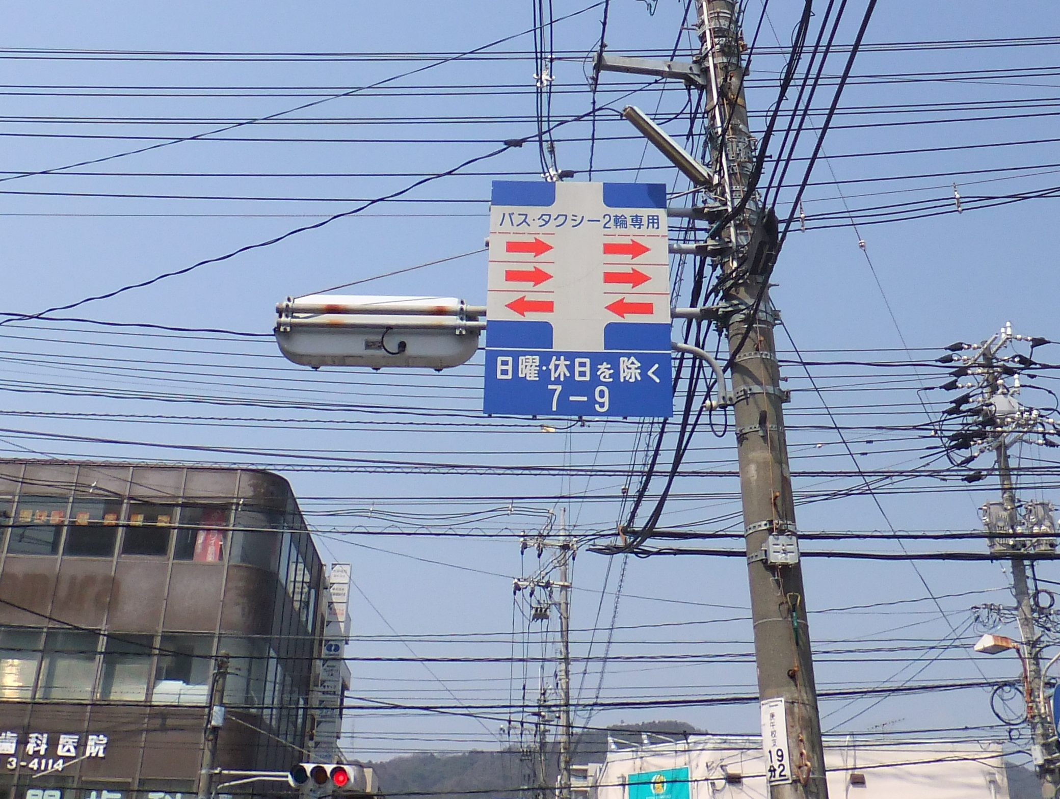 宮島街道・中央変移